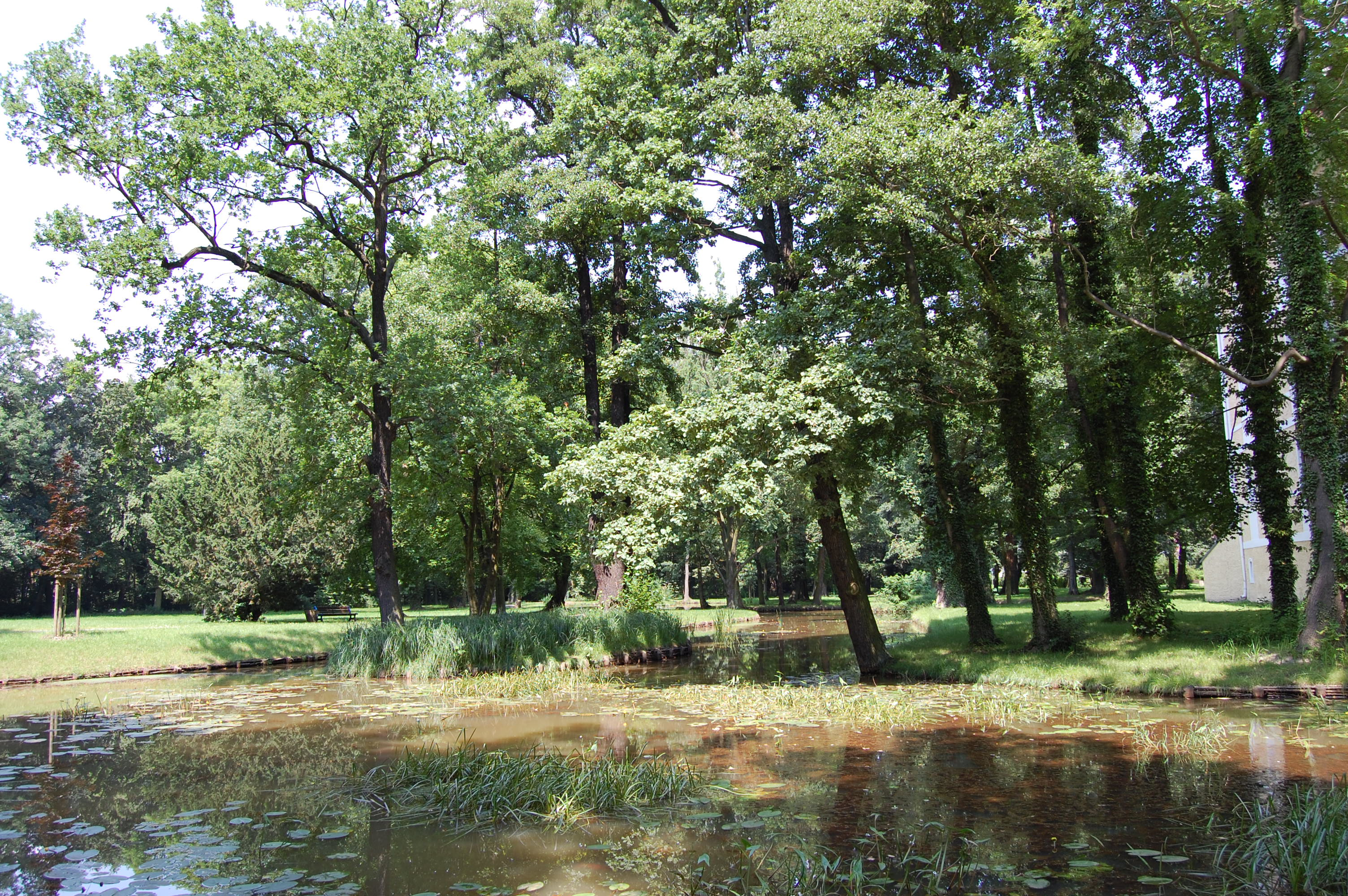 Schlosspark von Schloss Vetschau